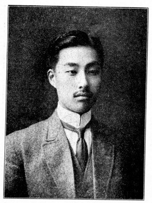 中文（台灣）: 王侃 議員